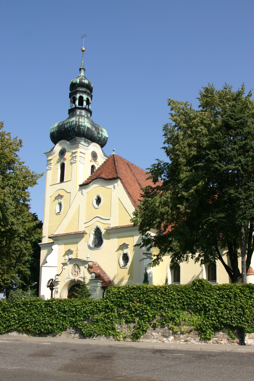 Jasiona - kościół parafialny p.w. św. Marii Magdaleny z kaplicą - prezbiterium starszego kościoła (zabytek nr A-118 z 7.05.2010 i 833/64 z 05.05.1964)